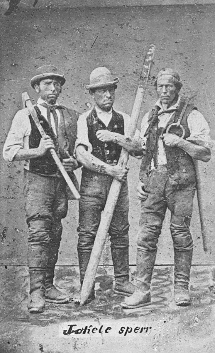 Drei Flößer, „Jokele sperr“. Visitkartenformat)